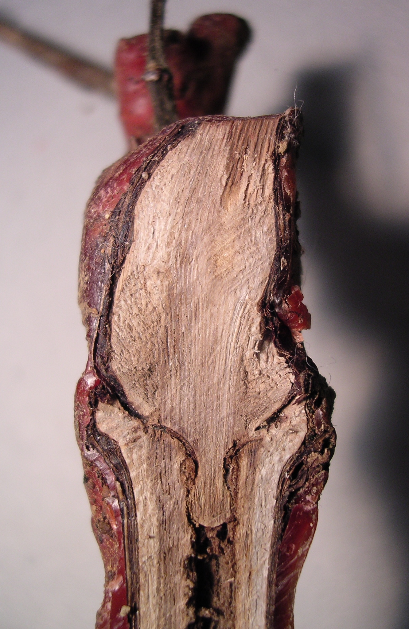 Chardonnay : greffe oméga